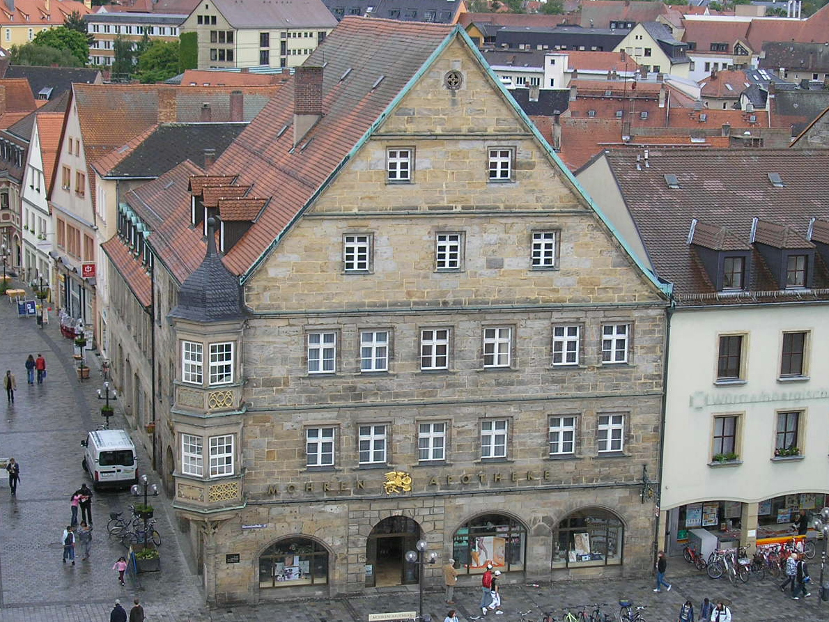 Die Mohren-Apotheke am Marktplatz von Bayreuth (fotografiert von der Karstadt-Dachterrasse)